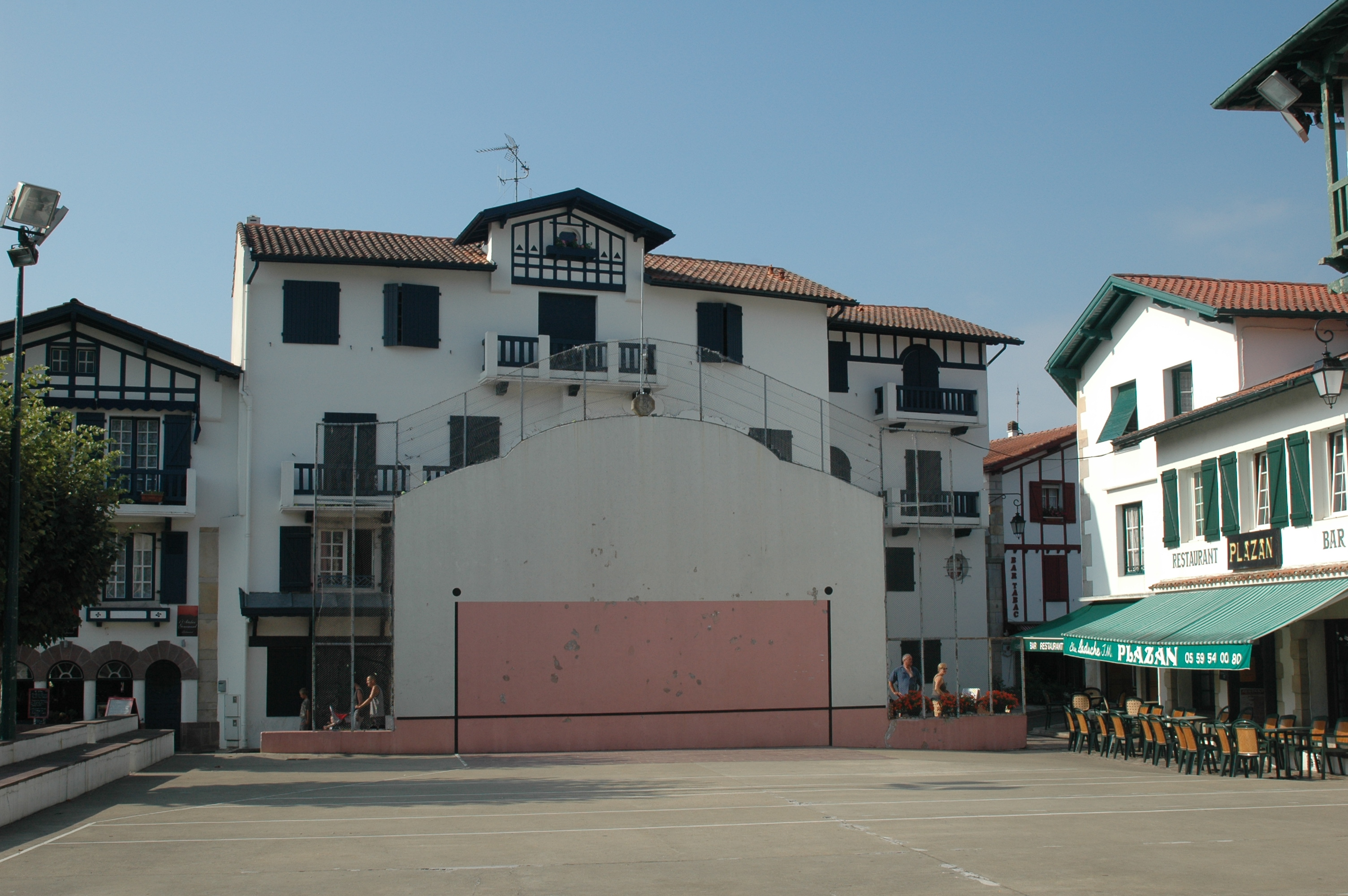 Ascain, le fronton. Photo prise le 23/07/06 par Harrieta171